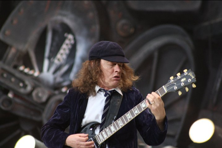 Angus Young au concert du Stade de France le 18 Juin 2010